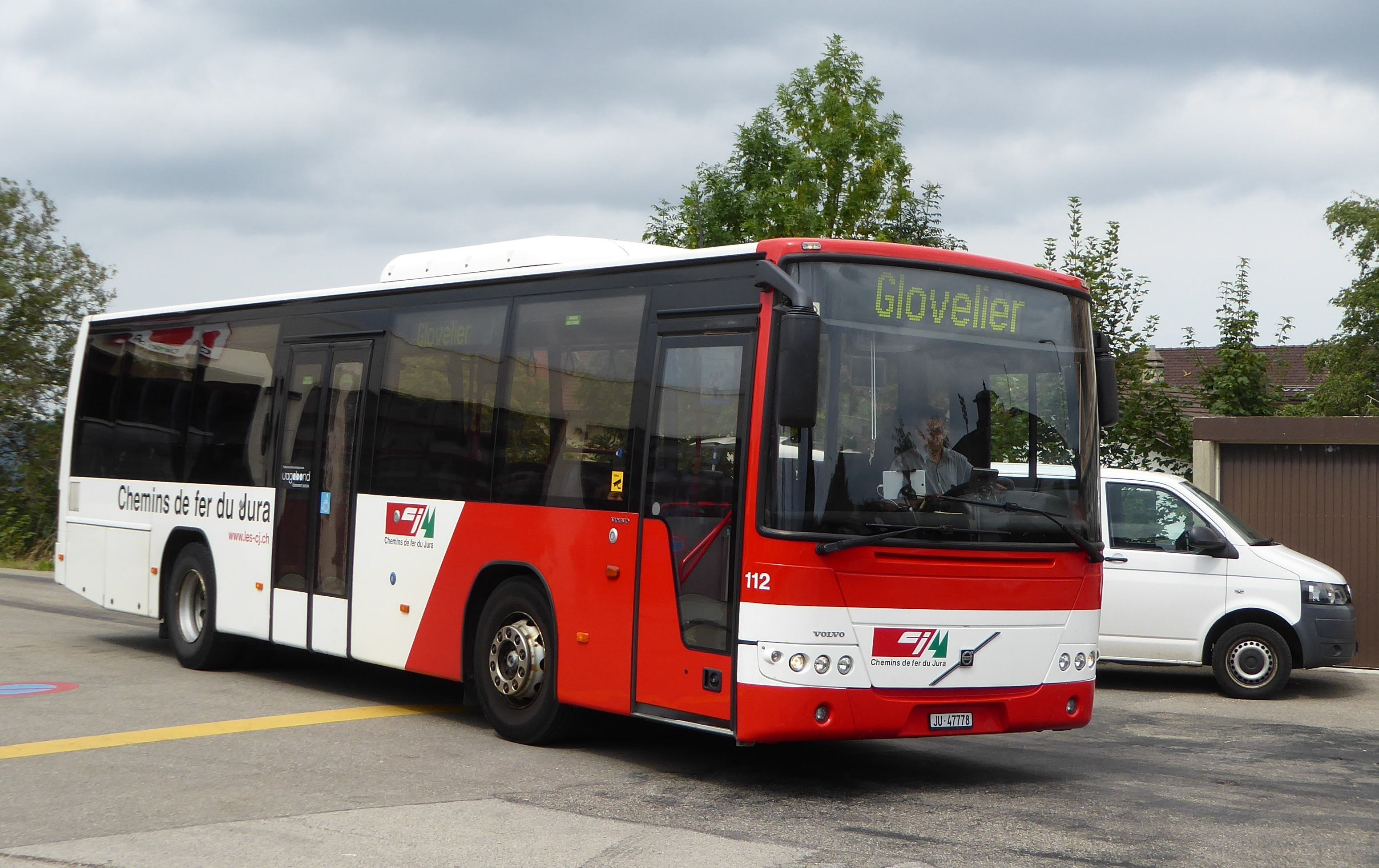 Volvo-Linienbus Nr. 112 der Chemins de fer du Jura mit dem Kontrollschild JU 47778 beim Bahnhof Saignelégier